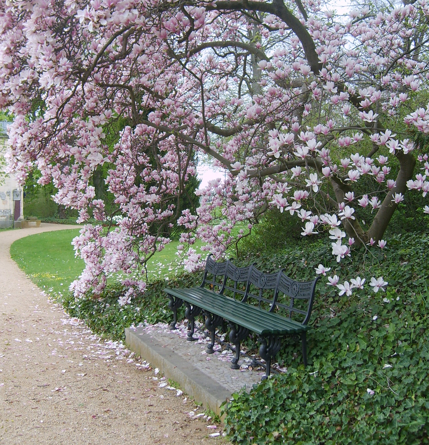 Park Klein Glienicke Magnolienbank 1.5.2013